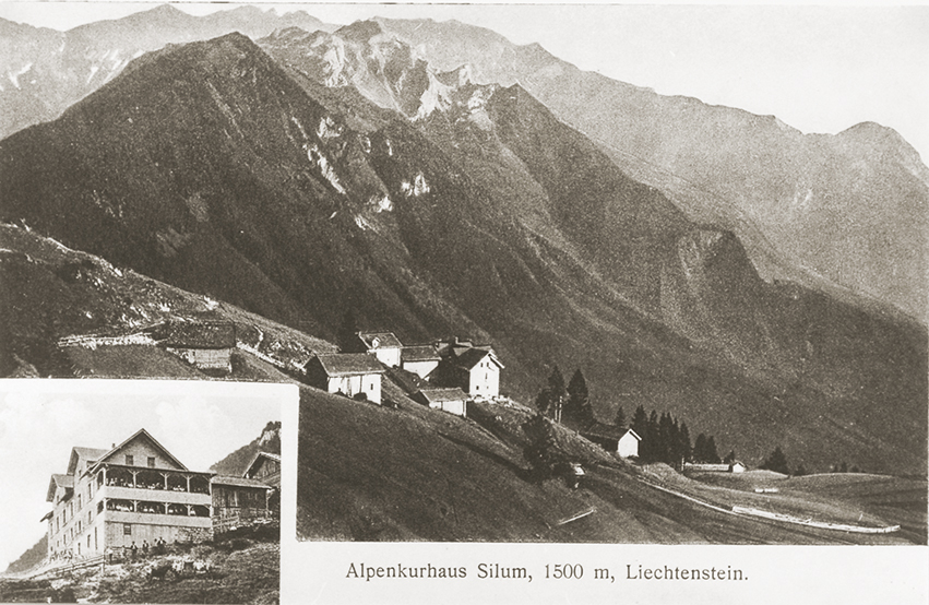 Postkarte «Alpenkurhaus Silum, 1500 m, Liechtenstein»